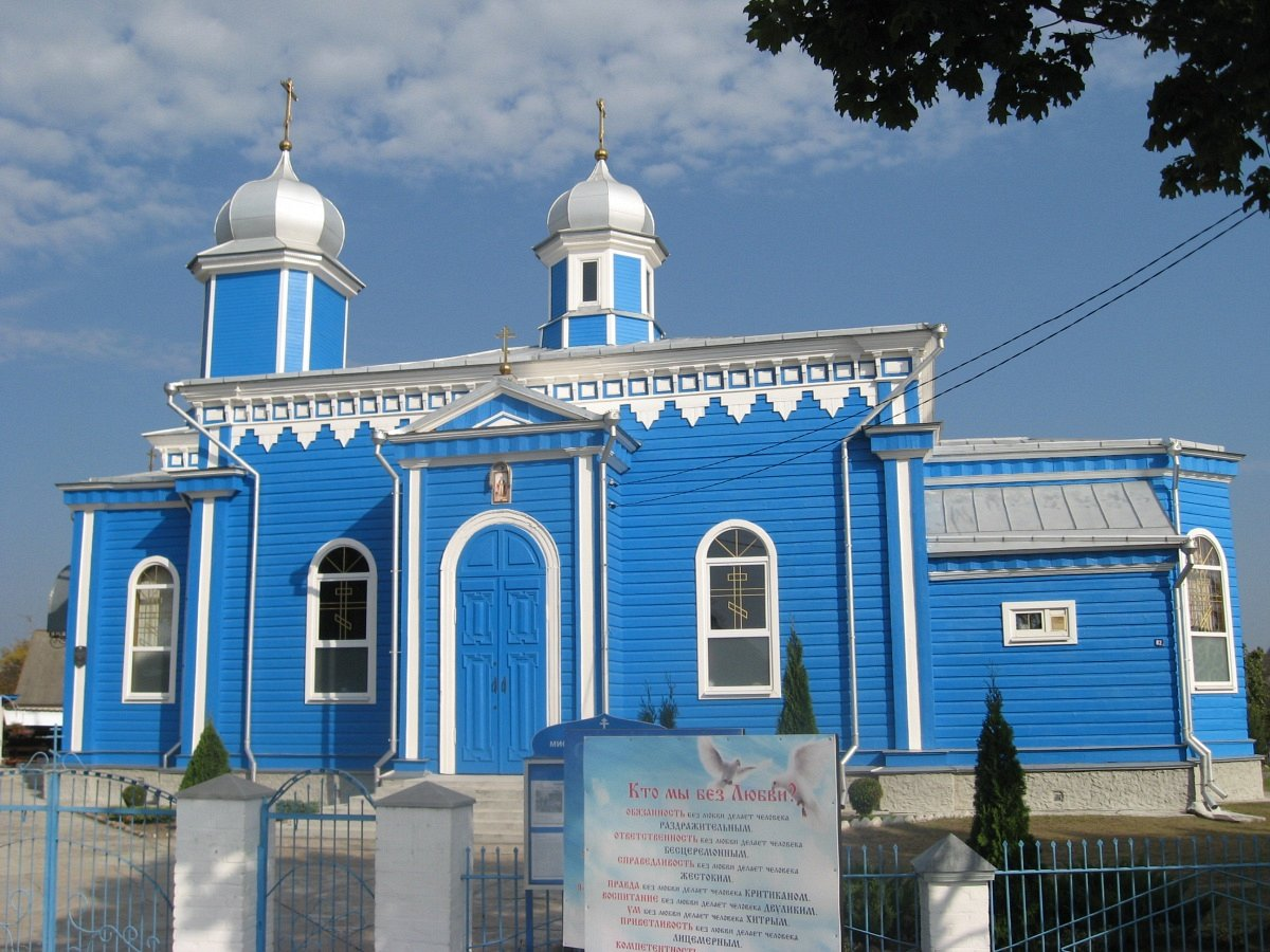 Жабінка. Пакроўская царква